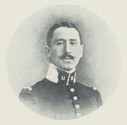 Capitaine de Lormel Officier de cavalerie, nommé capitaine au 2e B.C. P. Arrivé au corps en janvier 1916. Tombé glorieusement devant Douaumont le 25 février 1916. [1]